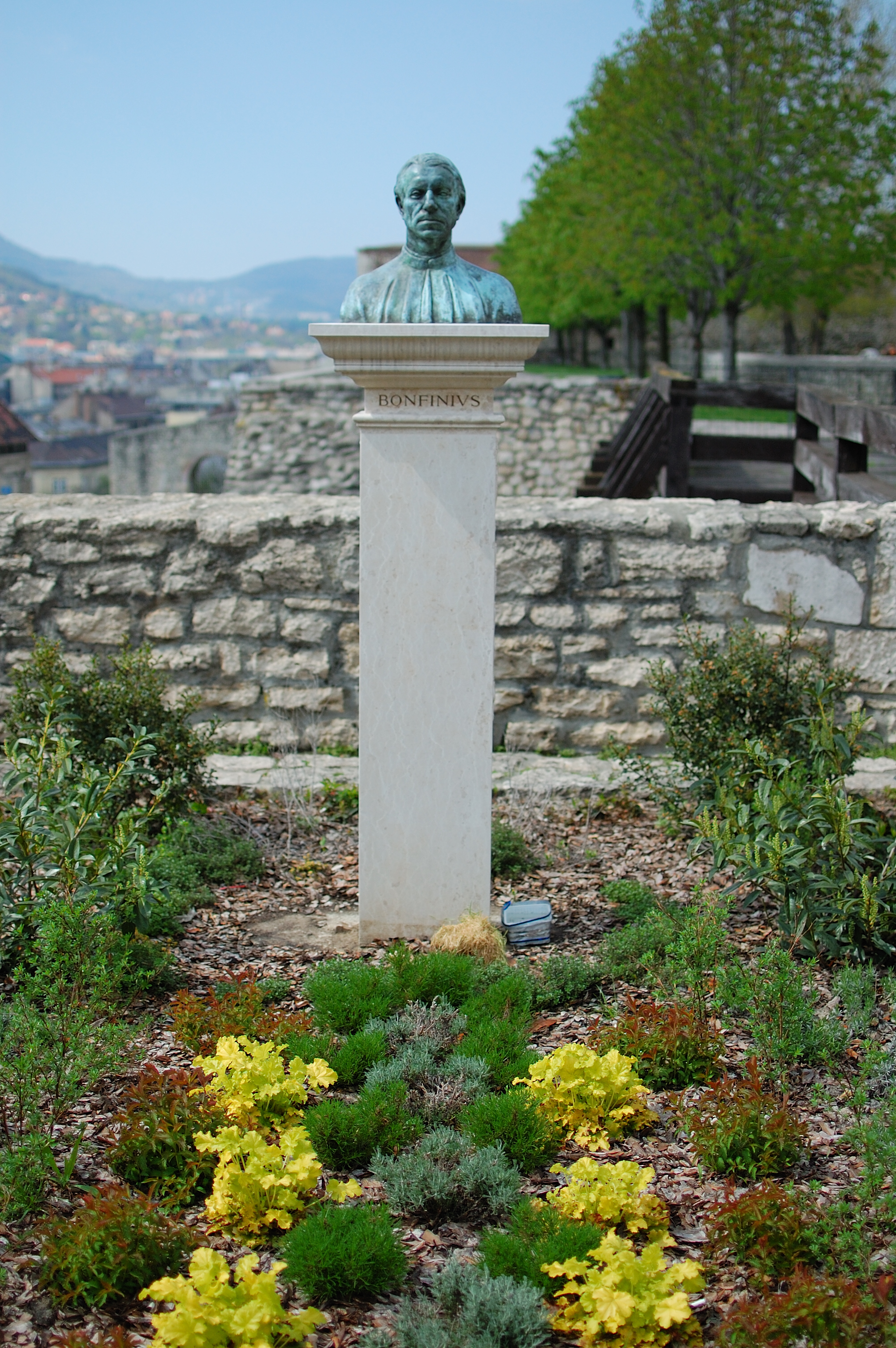 Antonio Bonfini bust in Budapest. sculptor: Zoltán Farkas